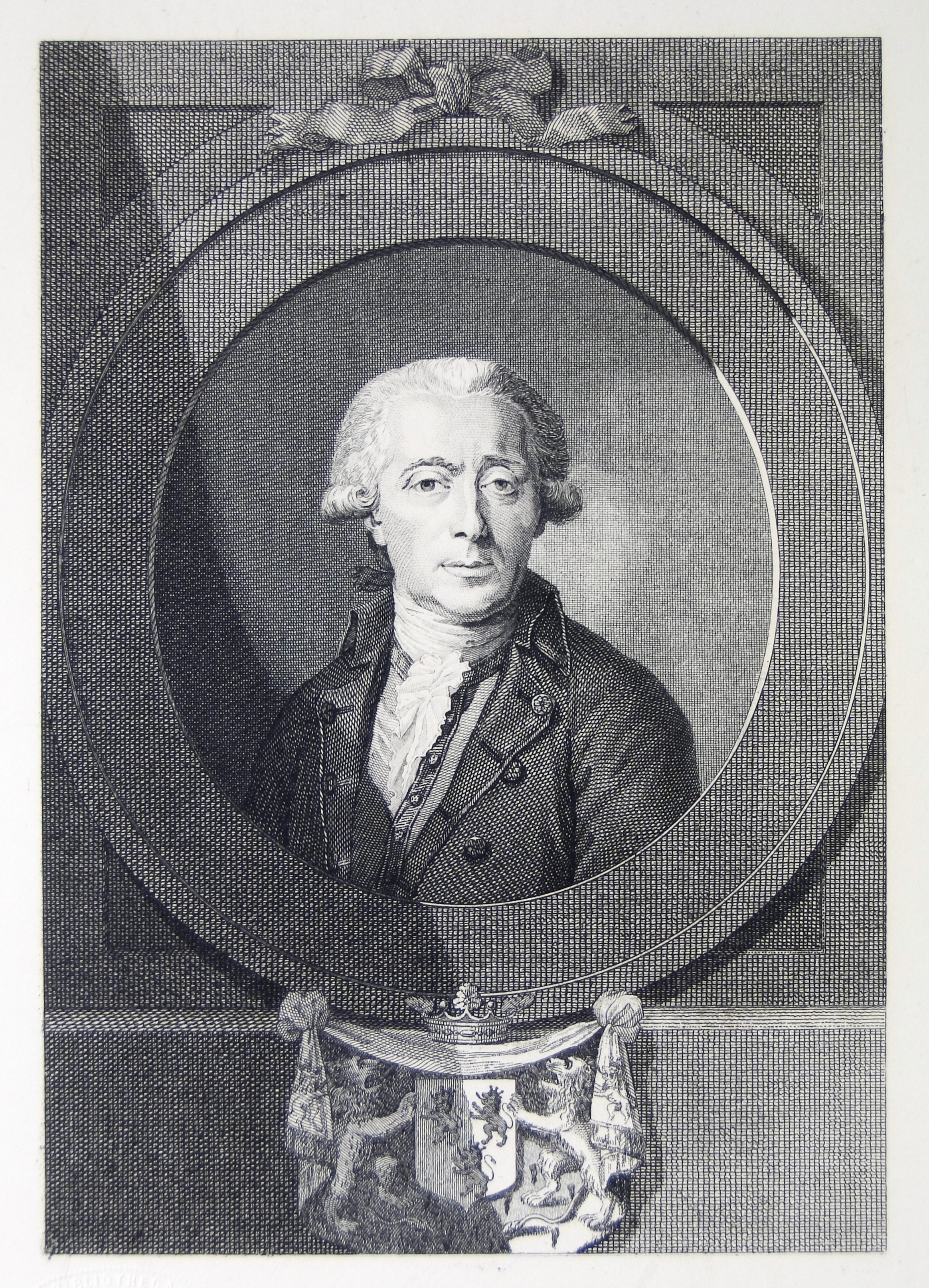 Portait du comte Joseph Ernest Grégoire de Lannoy de la Motterie gravé par André de Quertenmont vers 1787 pour le recueil des membres des Etats de Brabant.